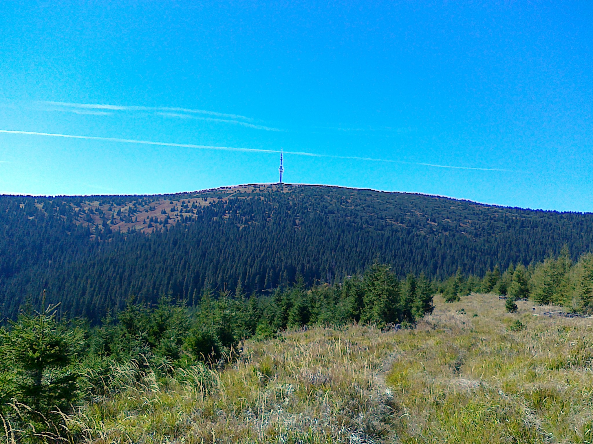 Widok z połaci szczytowej góry Sokol - 1187 m n.p.m. na górę Praděd - 1491 m n.p.m.